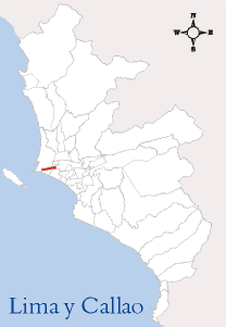 Localización del distrito de Bellavista Esta imagen ha sido elaborada por --Edgardo Reyes 18:31 9 mar, 2005 (CET) Categoría:Mapas del Perú (imagen)